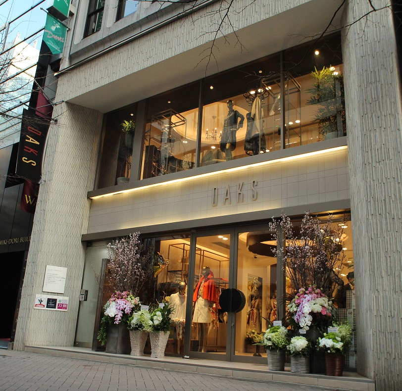 東京都中央区銀座4-3-13 DAKS銀座店